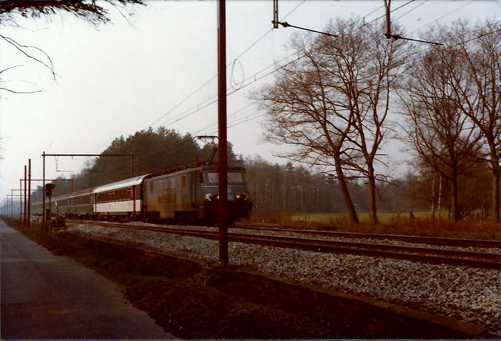 TEE "Etoile du Nord" naar Amsterdam gezien tussen Kapellen en Kapellenbos.